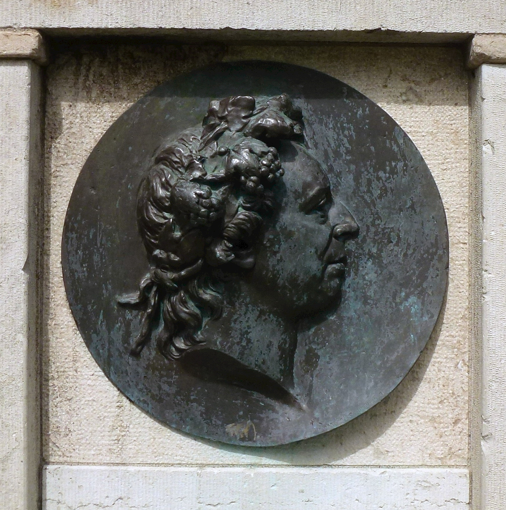 Johan Tobias Sergels medaljong på Bellmanskällan